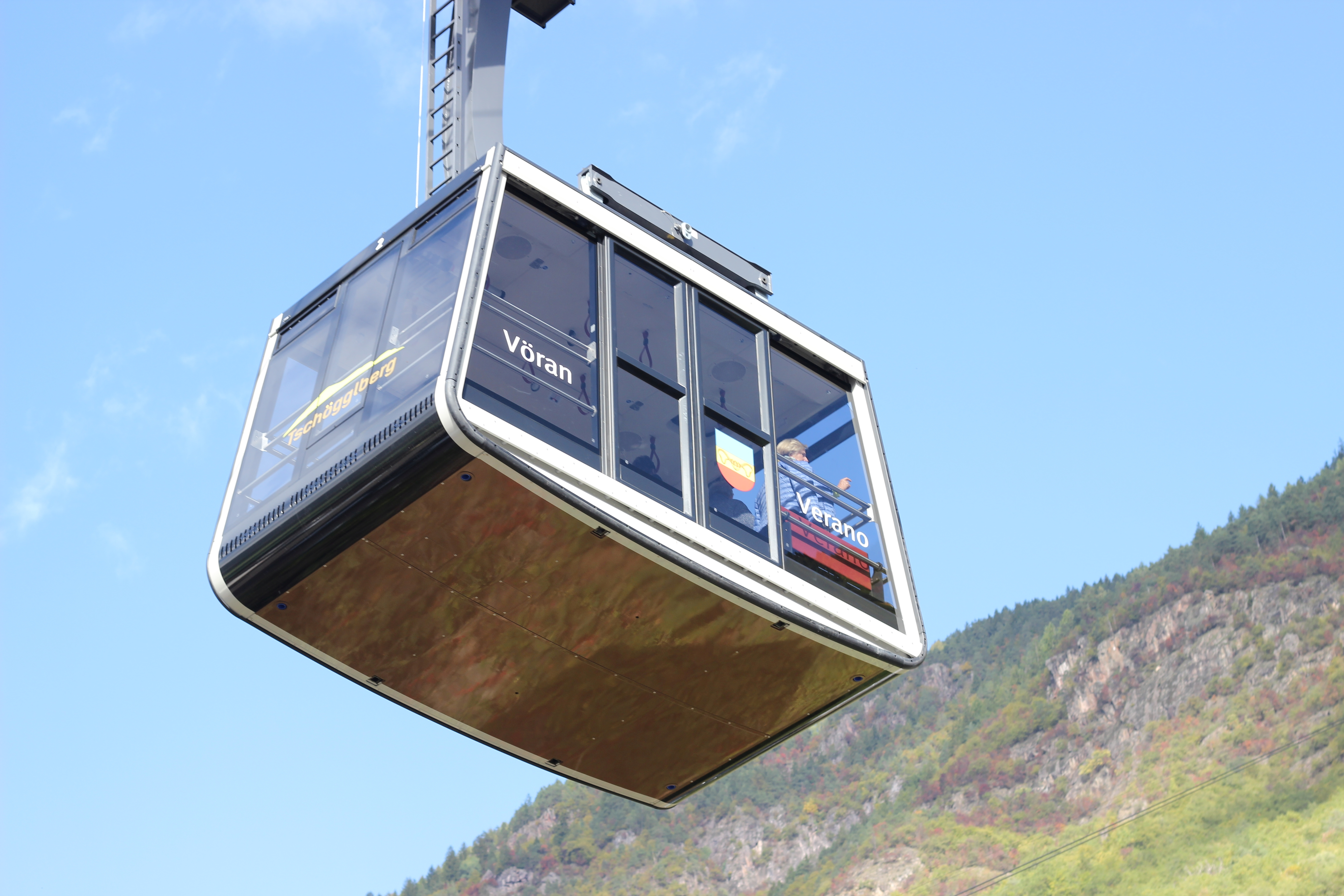 Vöraner Bahn, Kabine Oktober 2017